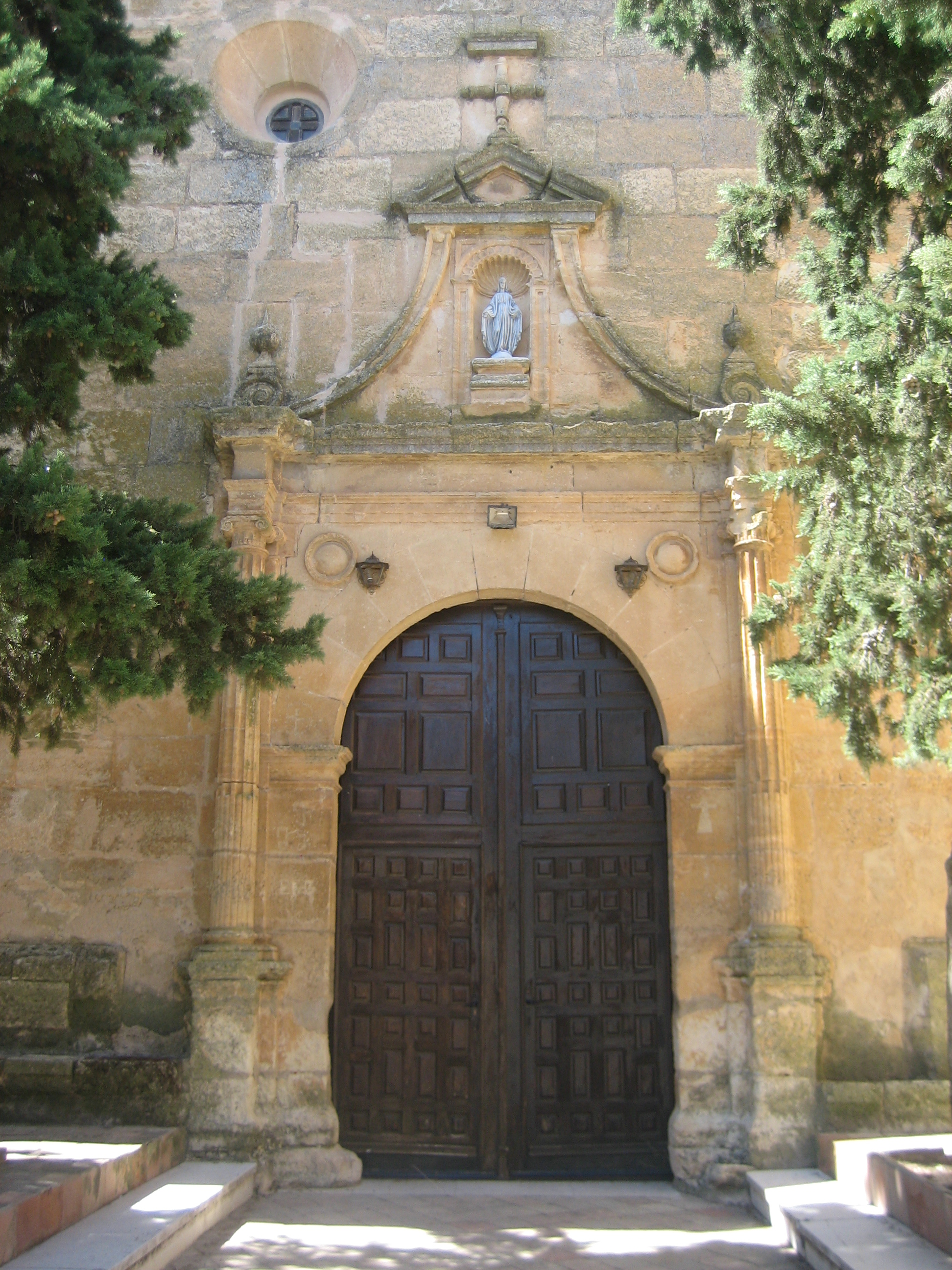 Puerta de la Iglesia de la Asunción de Nuestra Señora de Tébar